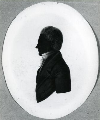 Epeus Manger Cats (1822-1896), burgemeester van Barradeel en Smallingerland